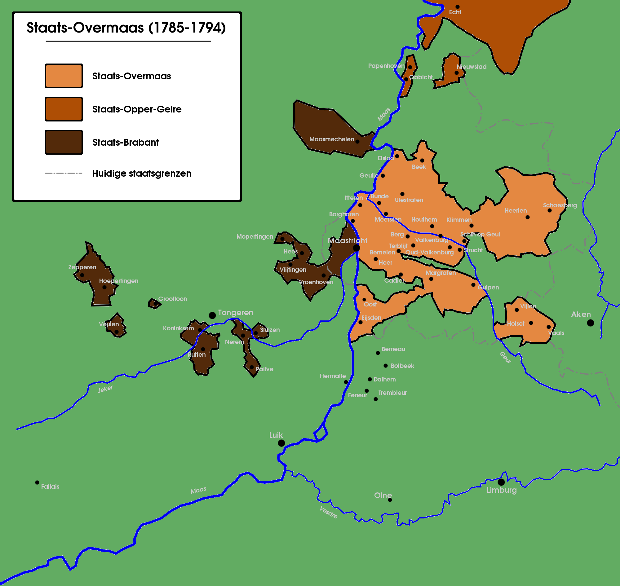 Kaart van Staats-Overmaas na het sluiten van het Verdrag van Fontainebleau in 1785 totaan het sluiten van het Verdrag van Den Haag.